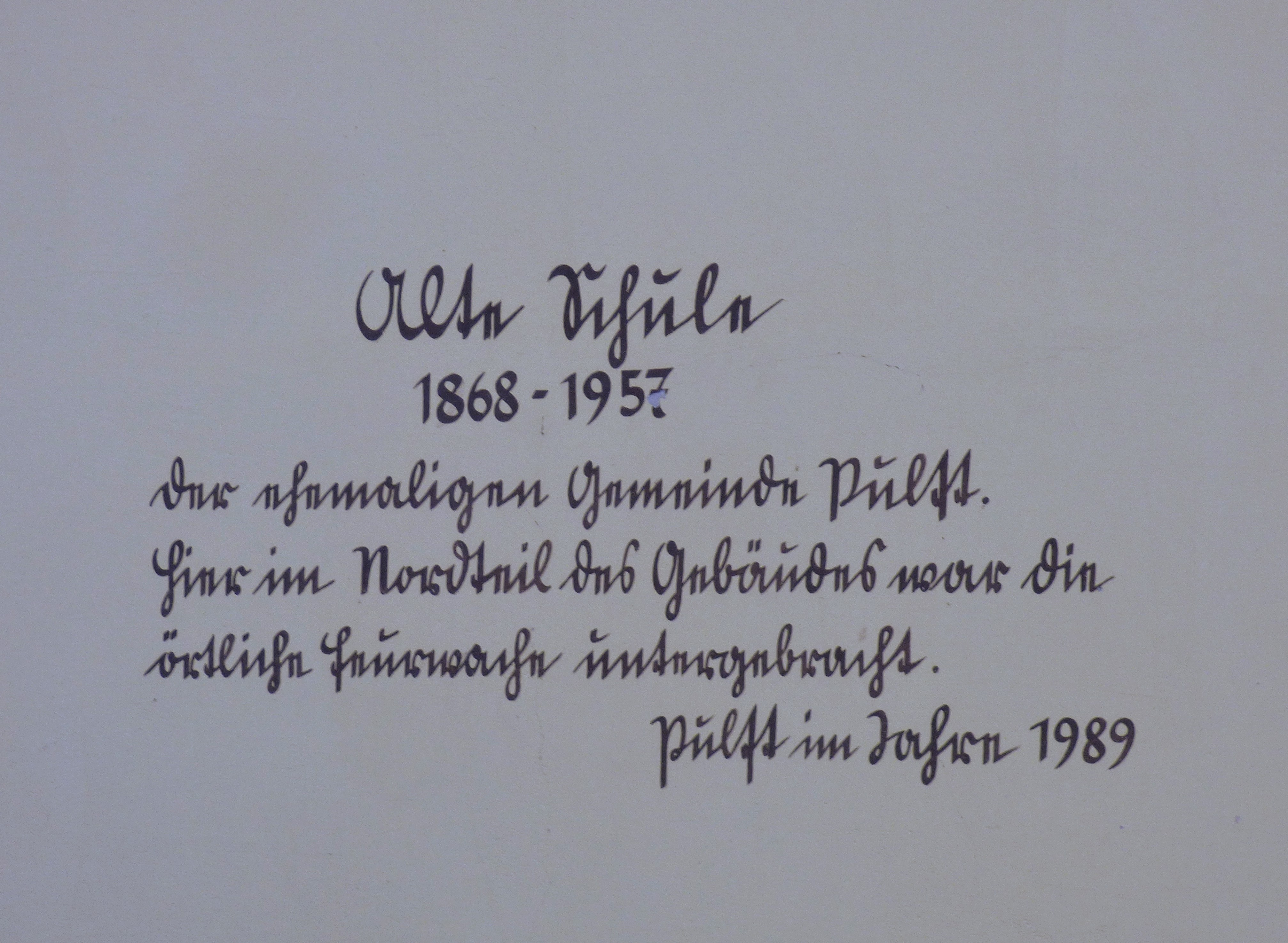 Aufschrift auf dem Gebäude der ehemaligen Volksschule Pulst, heute Gemeinde Liebenfels (Kärnten)